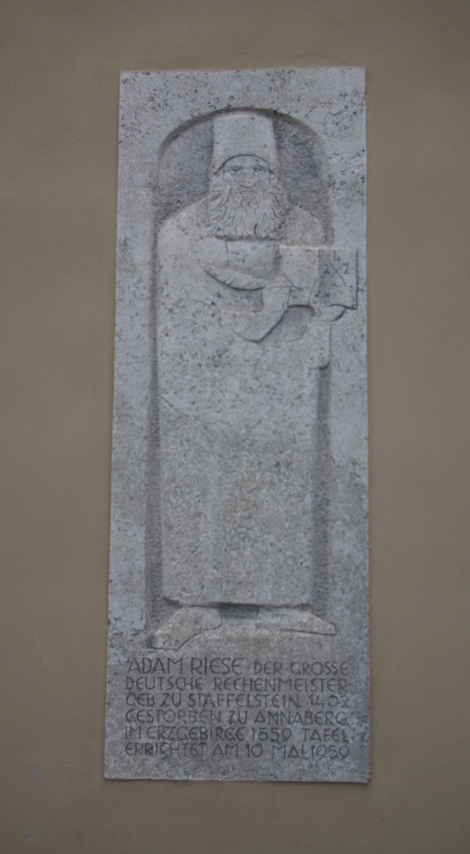 Sandsteinrelief von Karl Potzler (1920-1995) am Rathaus in Bad Staffelstein. Aufschrift: ADAM RIESE DER GROSSE DEUTSCHE RECHENMEISTER. GEB. ZU STAFFELSTEIN 1492 GESTORBEN ZU ANNABERG IM ERZGEBIRGE 1559. TAFEL ERRICHTET AM 10. MAI 1959